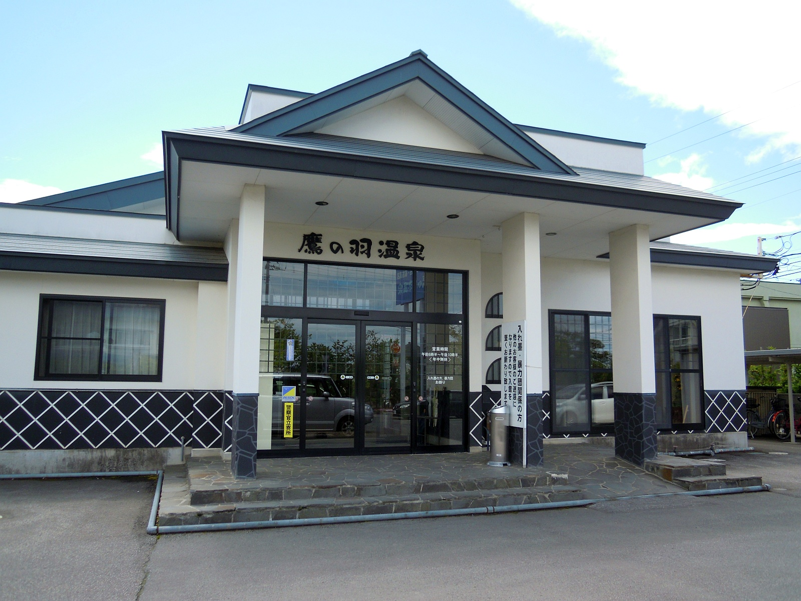 青森県平川市にある鷹の羽温泉の外観